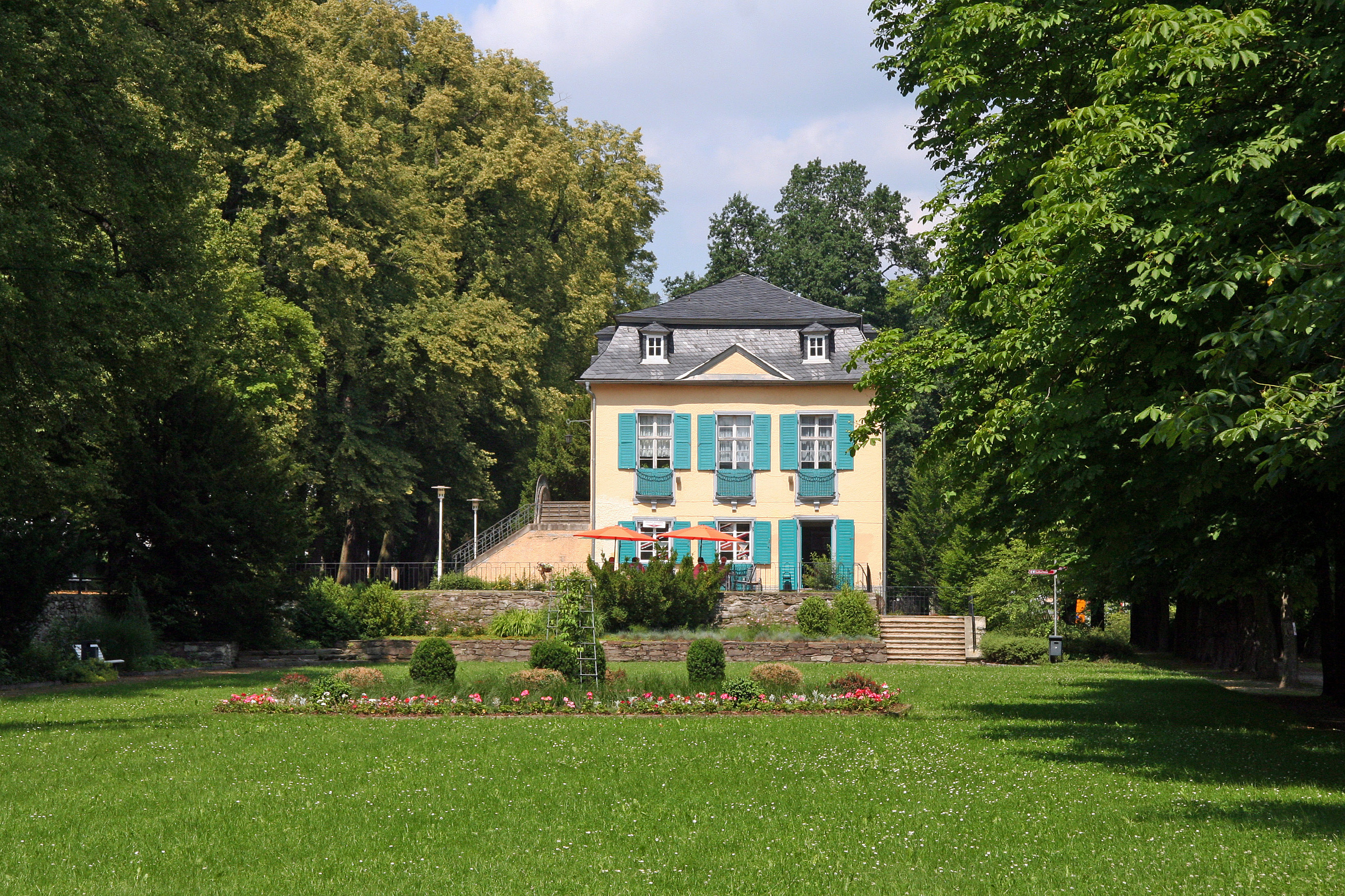 Pavillon im Kurpark von Bad Lobenstein